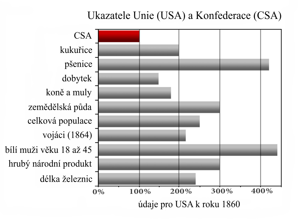 US economic advantages over CSA 1860 US economic advantages over CSA 1860